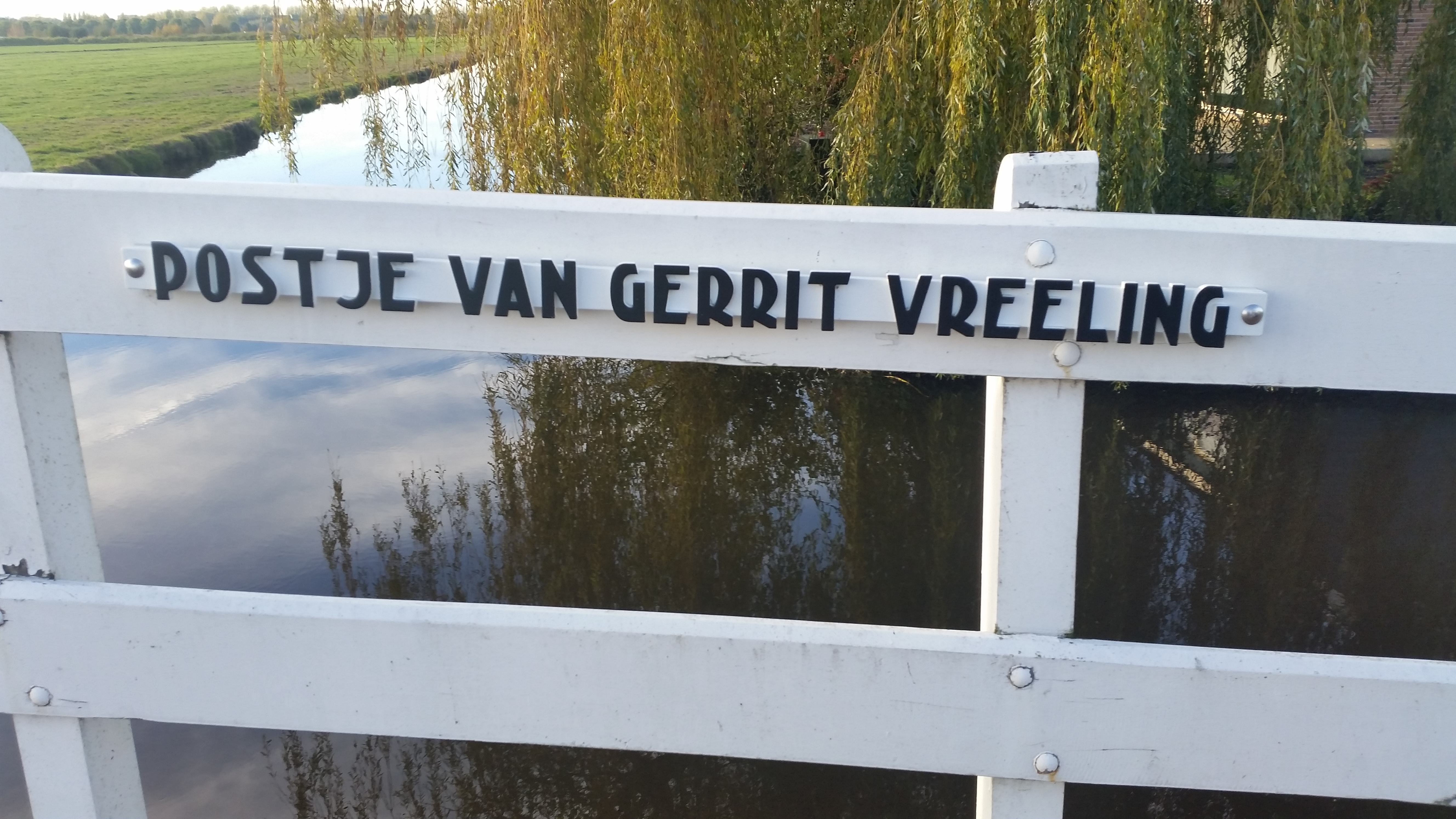 Brug 351, Postje van Gerrit Vreeling, naamplaat